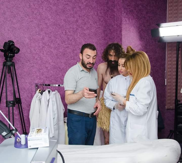 Natiq Axund reklam çəkilişi prosesi